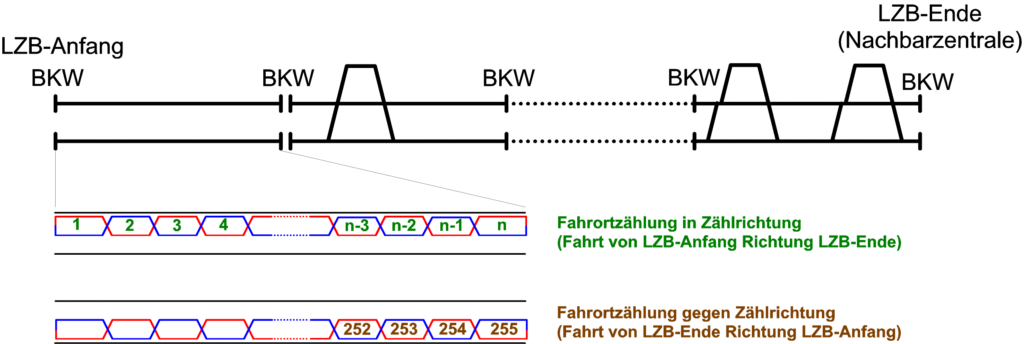 Beschreibung: LZB-Topologie Herkunft: Selbst gezeichnet Autor: SteveK 22:33, 25. Aug 2005 (CEST)